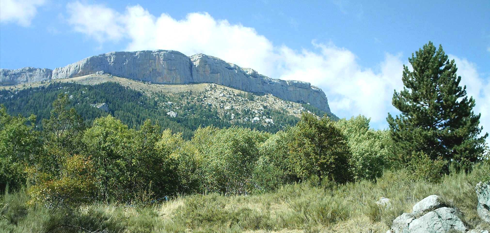 Vue sur la corniche de Céûse( versant sud) depuis la commune de Sigoyer